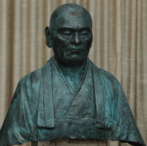 Taisen Deshimaru, Bronze, ZenHausGrötzingen